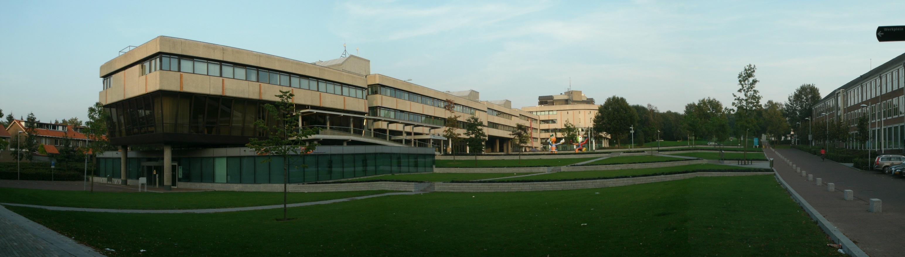 Gemeentehuis Ede met omgeving.